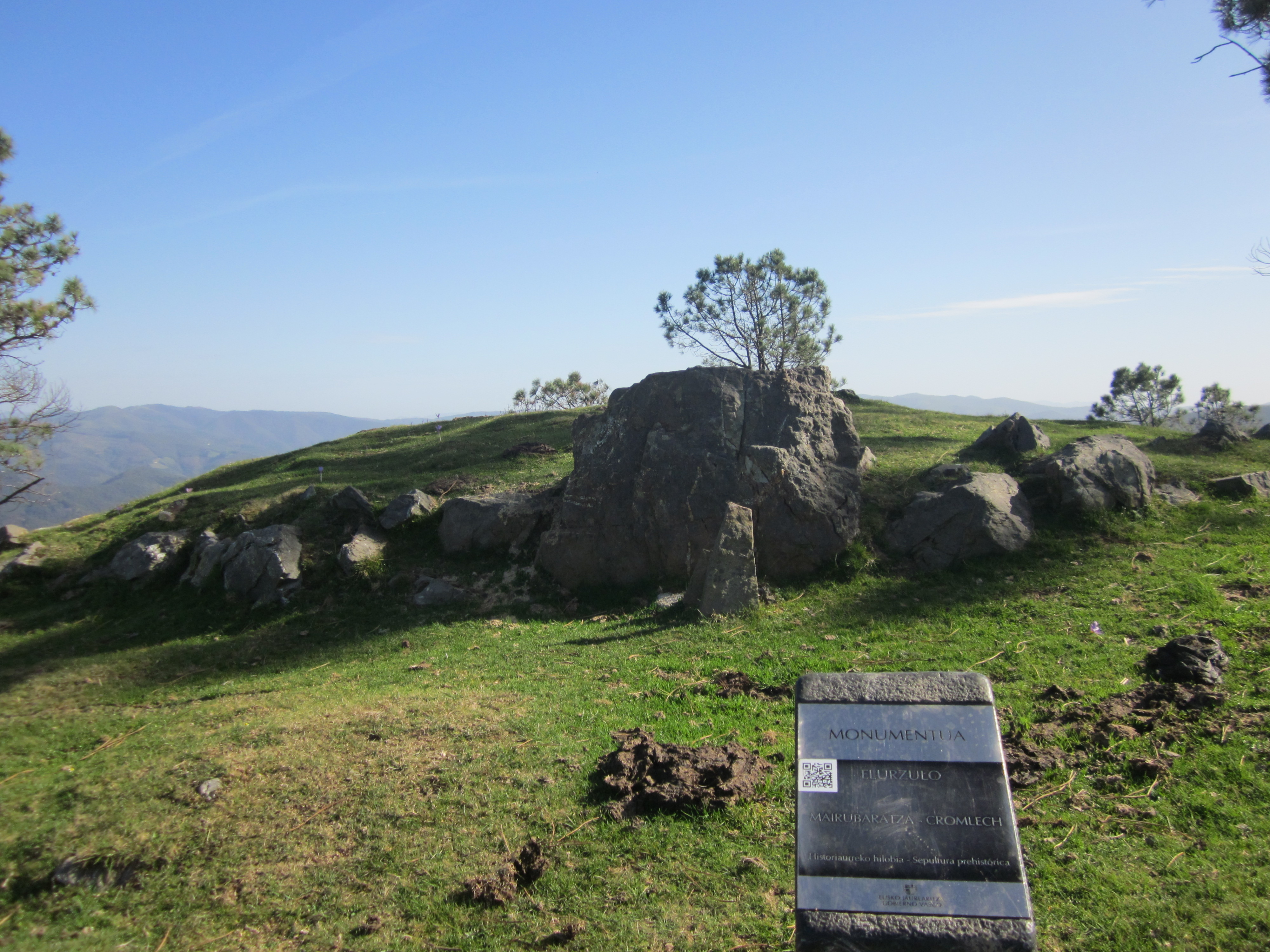 Panneau et crómlech